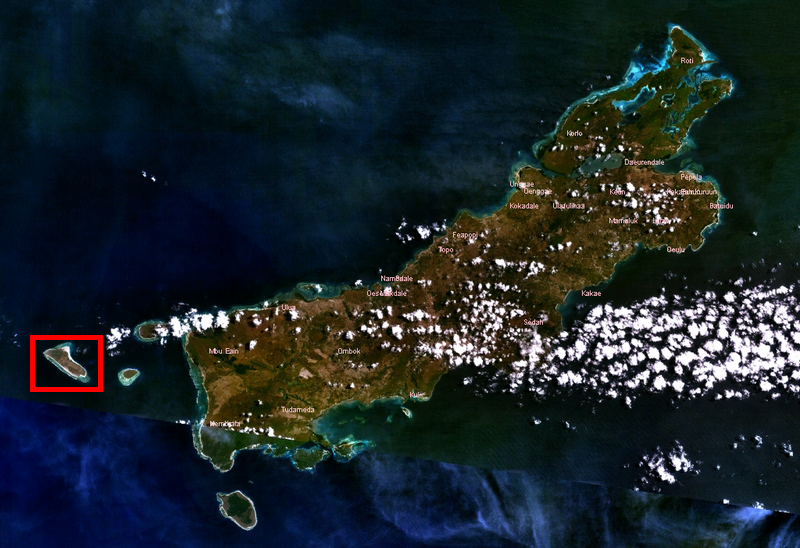 Ligging van het eiland Ndao. Eigen werk, gebaseerd op "legale" afbeelding.